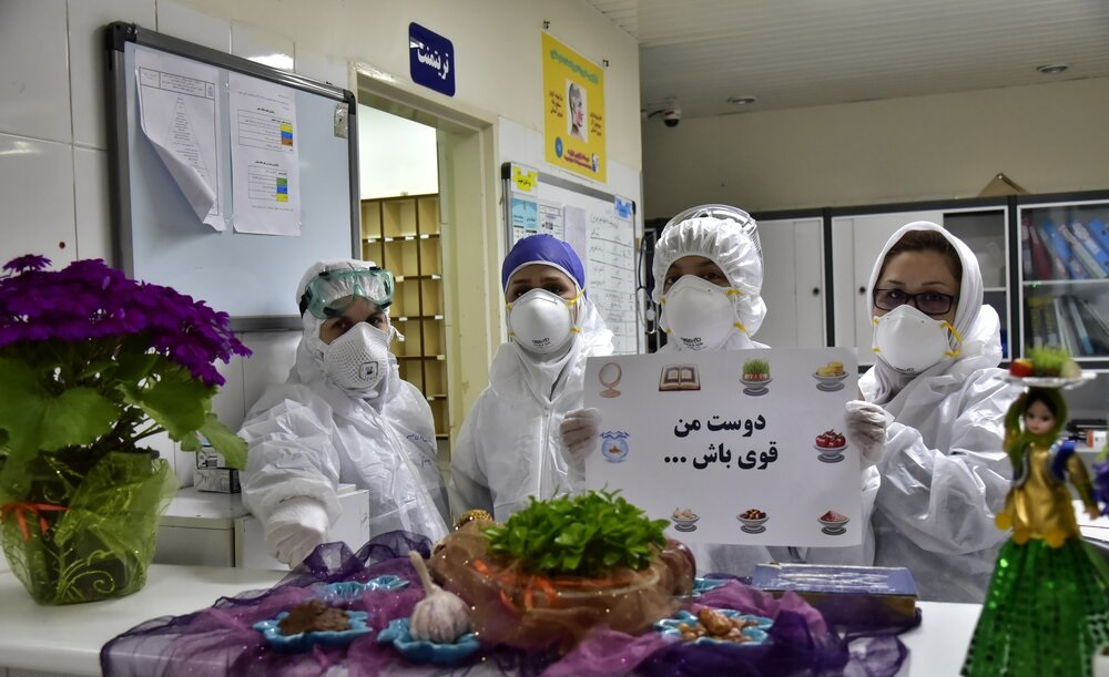 تحویل سال ۹۹ همراه سفیدپوشان خط مقدم مبارزه با کرونا